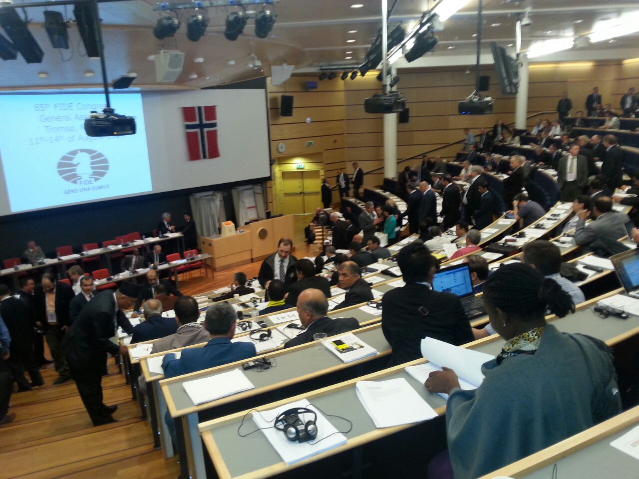 20140811 Assamblea FIDE